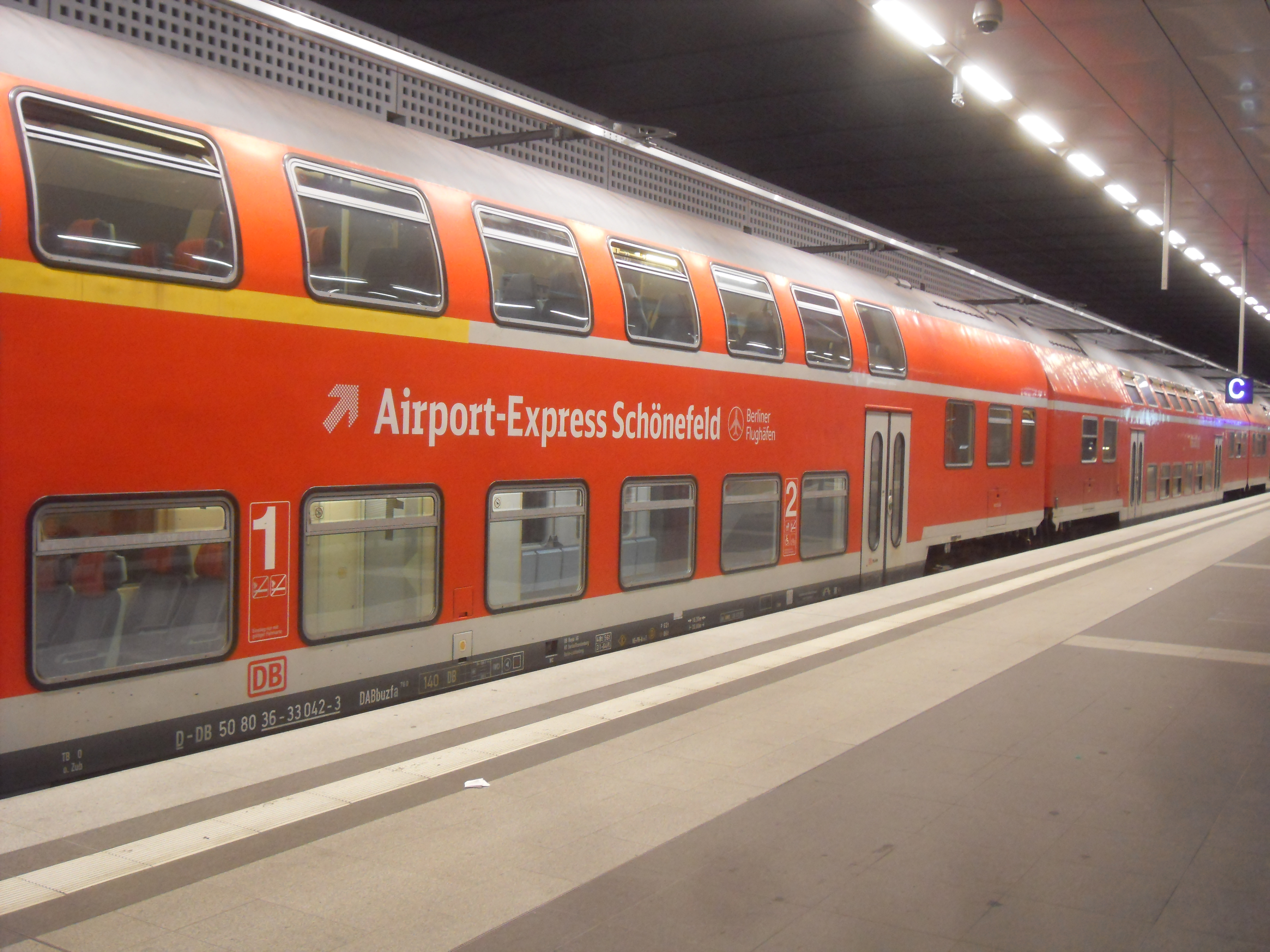 Der „Airport-Express Schönefeld“ auf Gleis 1 des Berliner Hauptbahnhofs